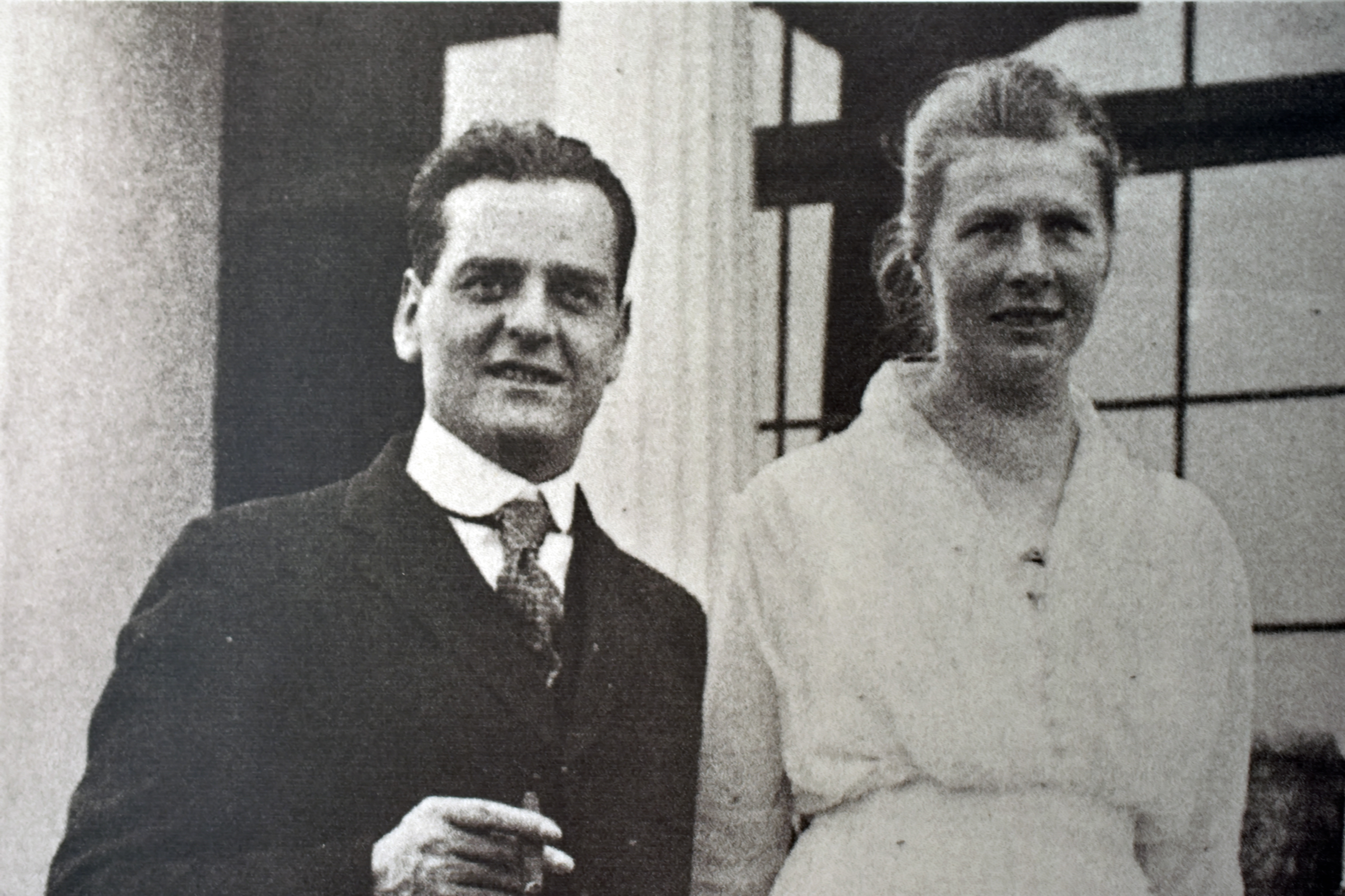 Adele Duttweiler & Gottlieb Duttweiler, Park im Grüene in Rüschlikon (Switzerland)